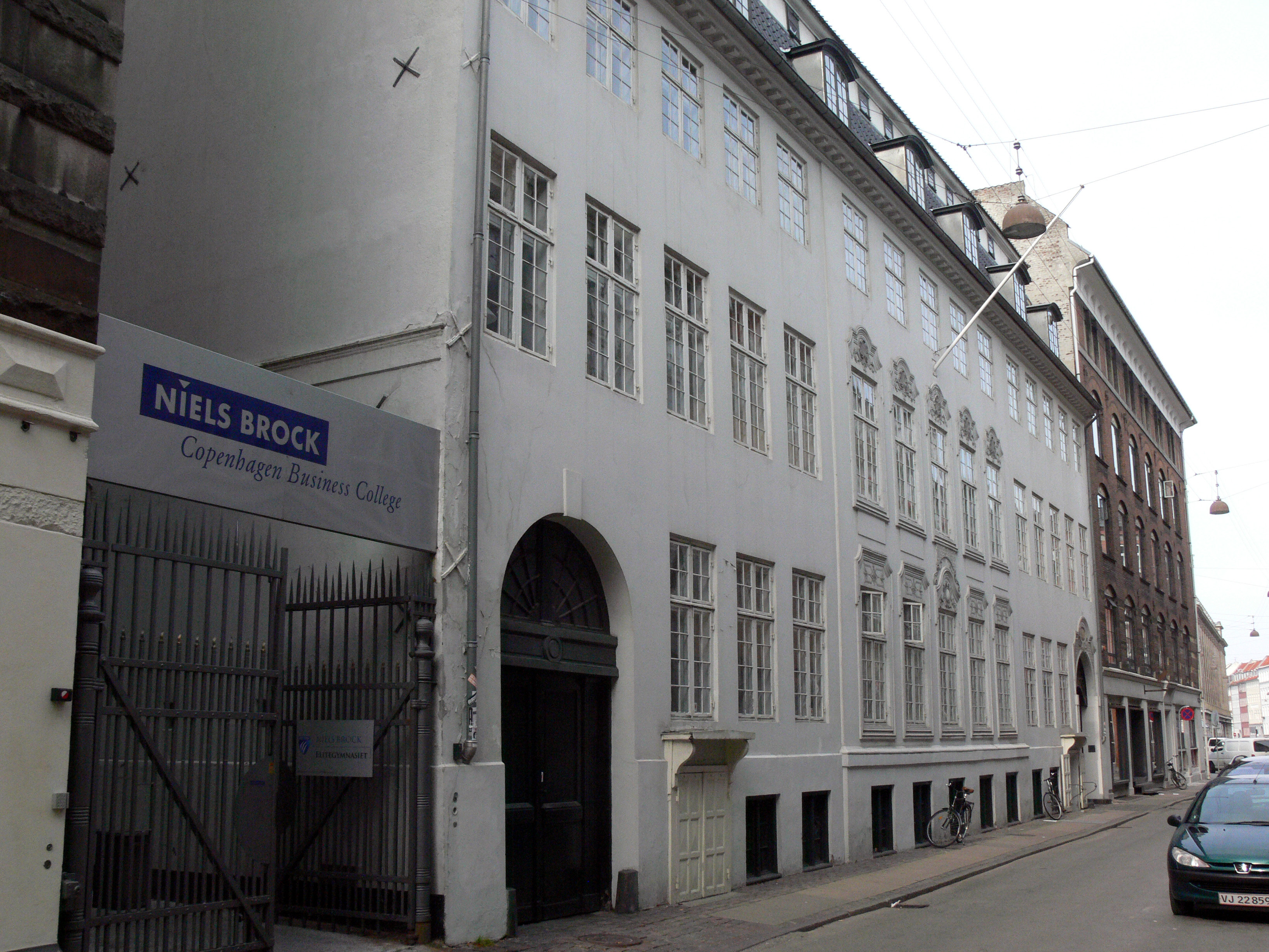 Das Stammhaus des Gyldendahl-Verlages in Kopenhagen.